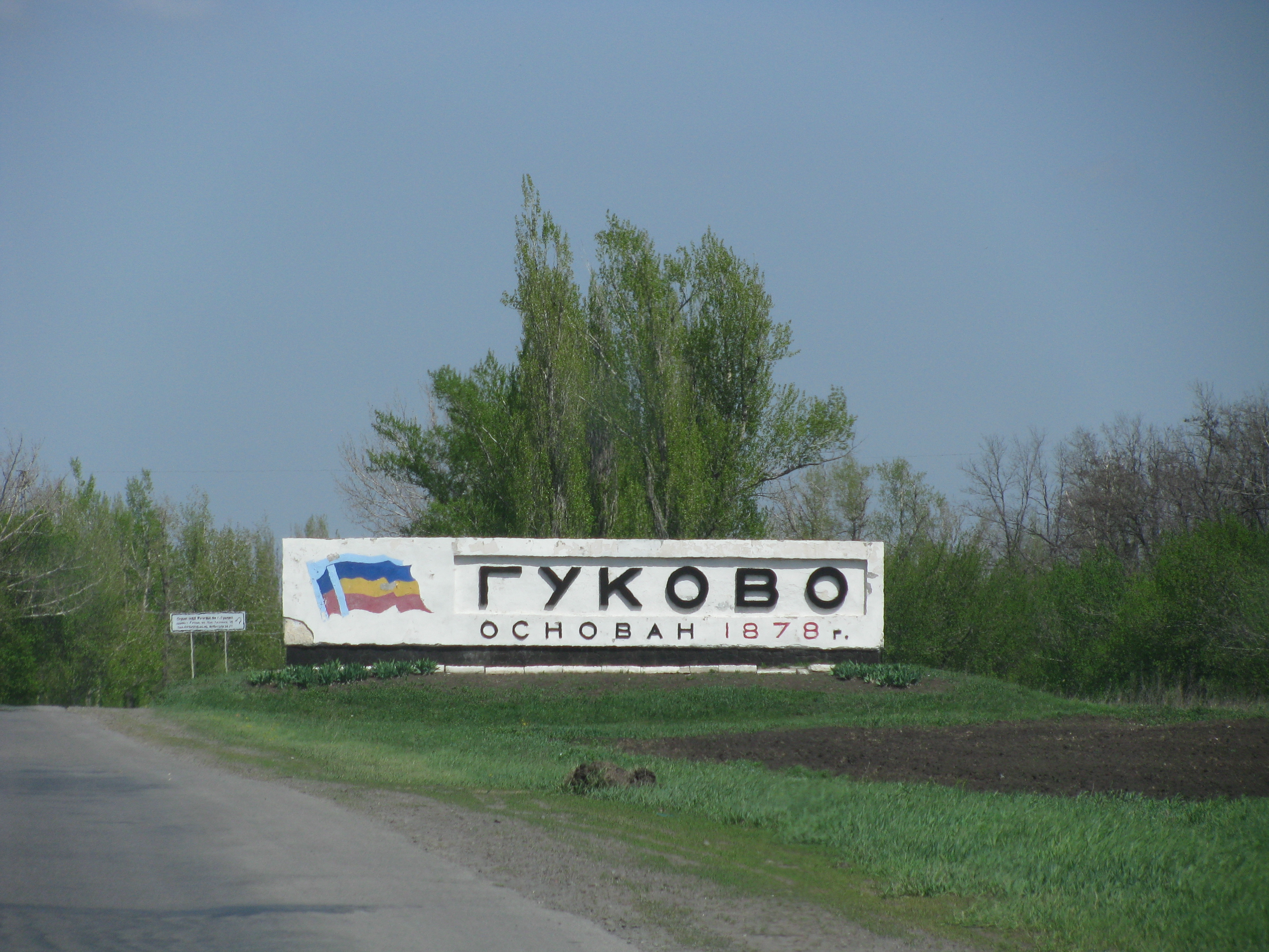 На въезде в Гуково